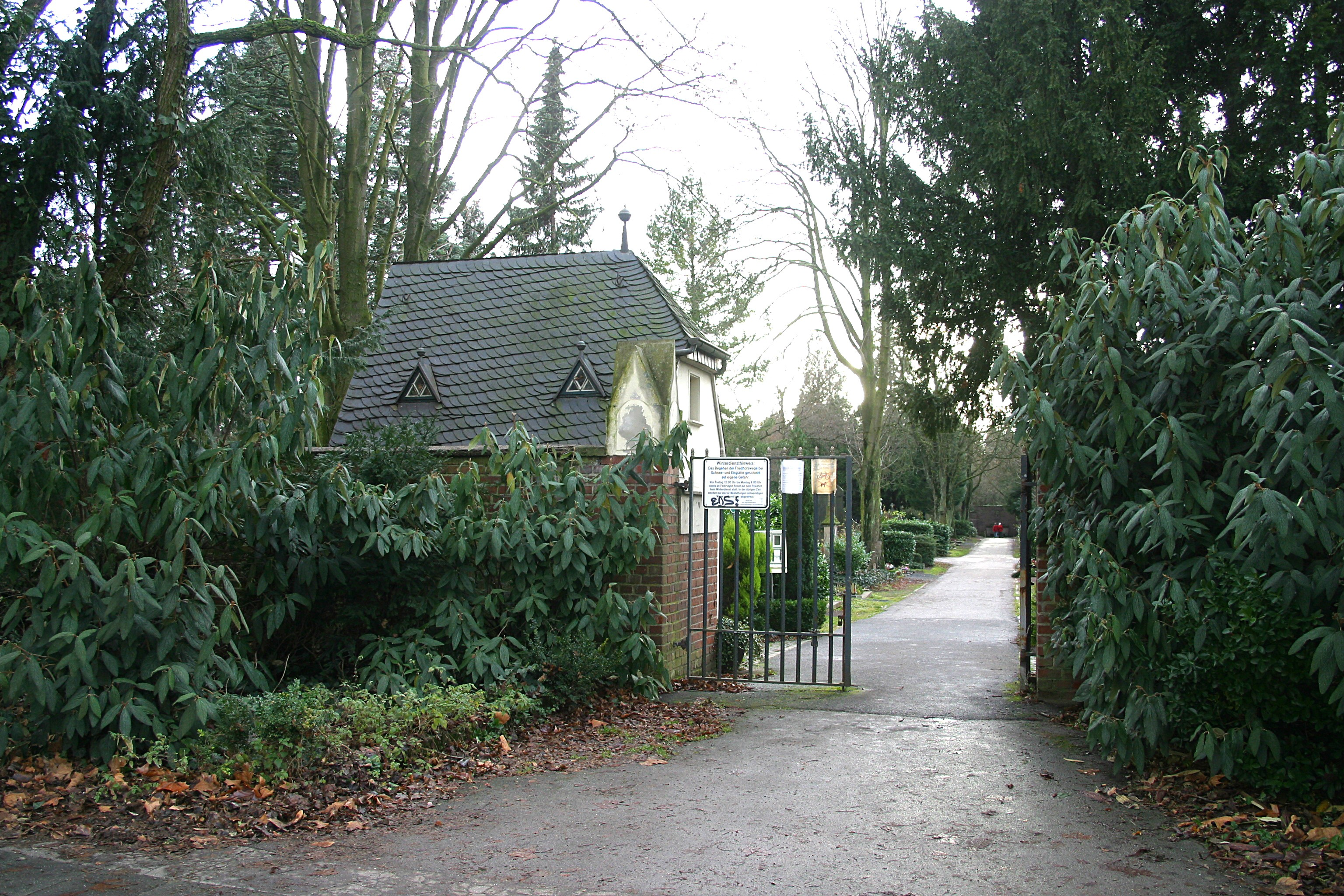 Alter Ehrenfelder Friedhof: Der Alte Ehrenfelder Friedhof liegt im Nordwesten des Melatenfriedhofsgelände. Er ist ein Teil des 435.000 m² großen MelatenfFriedhofs. Er liegt im äußerern nordwestlichen Teil des Gebietes. Begrenzt durch eine Mauer im Norden entlang der Weinsbergstrasse und im Westen entlang der Fröbelstrasse hat er seinen Zugang auf der Weinsbergstrasse (siehe Karte weitere Bilder). This is a photograph of an architectural monument.